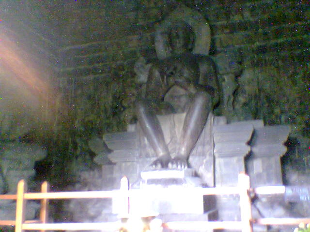 Gemaakt door Meursault2004 op 10 december 2005.